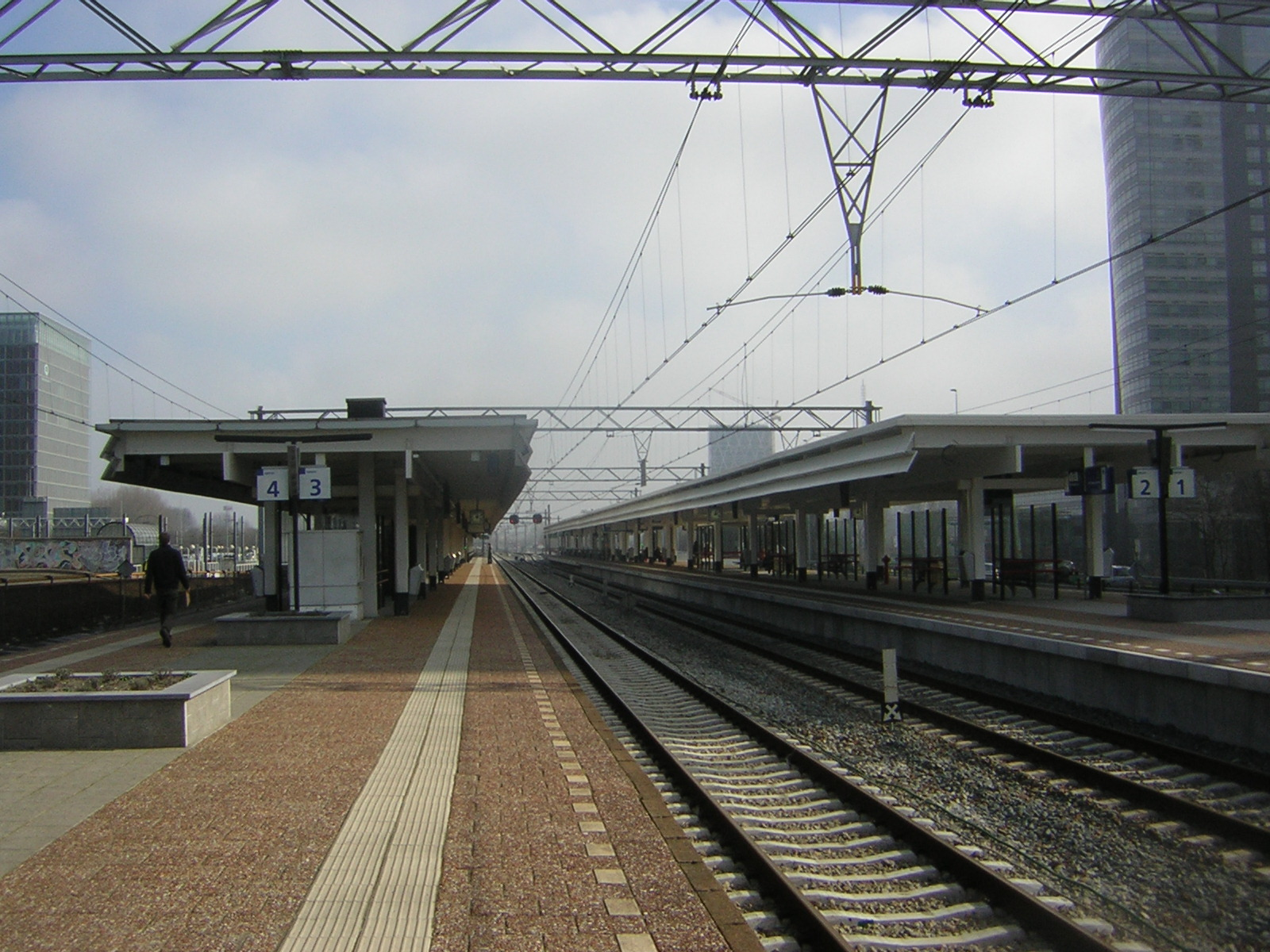 Station Amsterdam Zuid. Eigen opname.